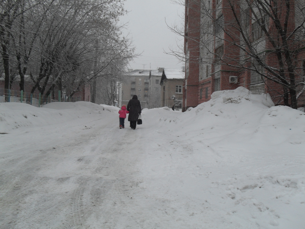 Енисейская улица Казани